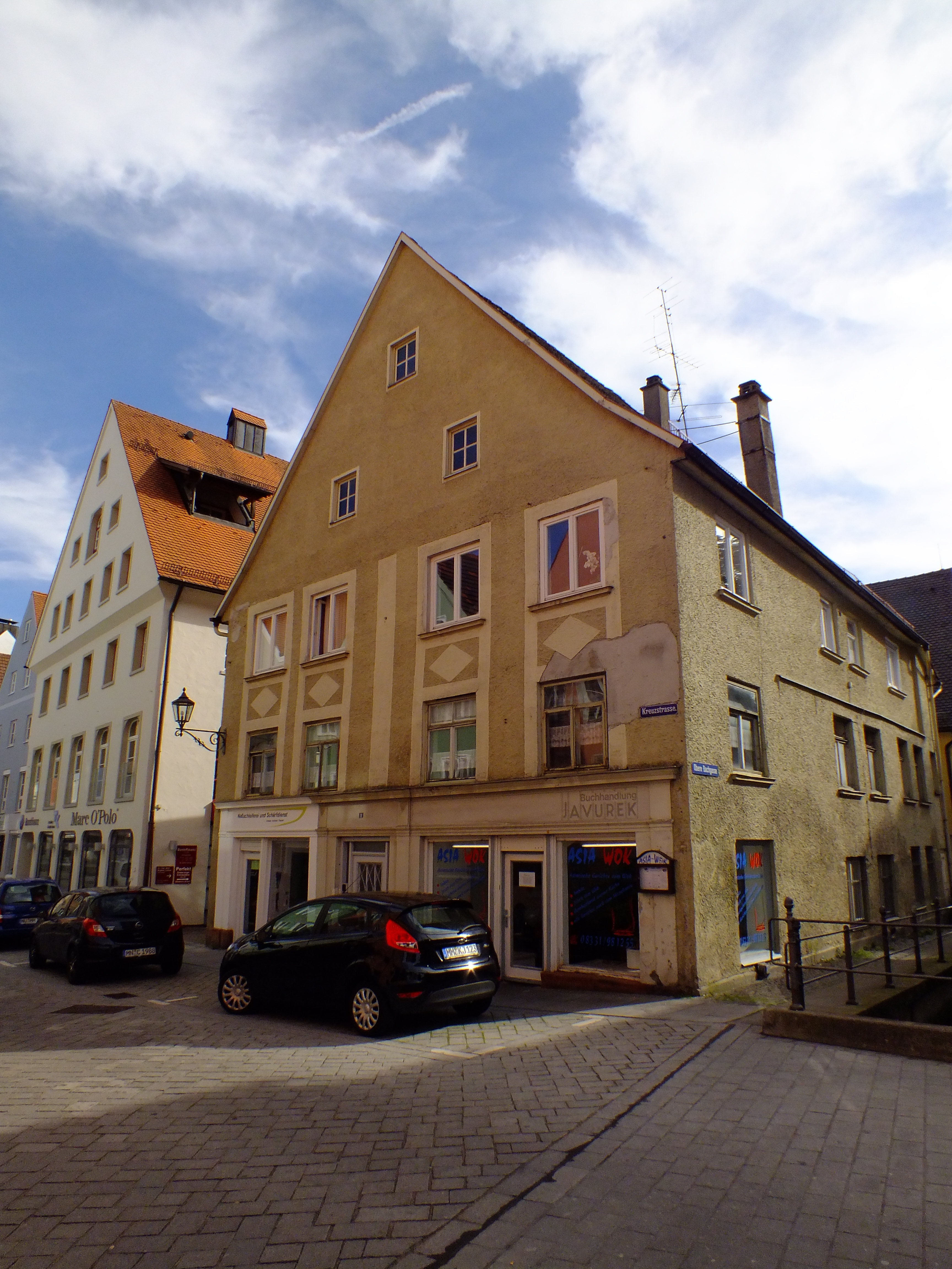 Baudenkmal im oberschwäbischen Memmingen